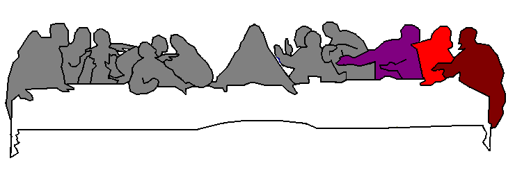 Last supper by Leonardo da Vinci